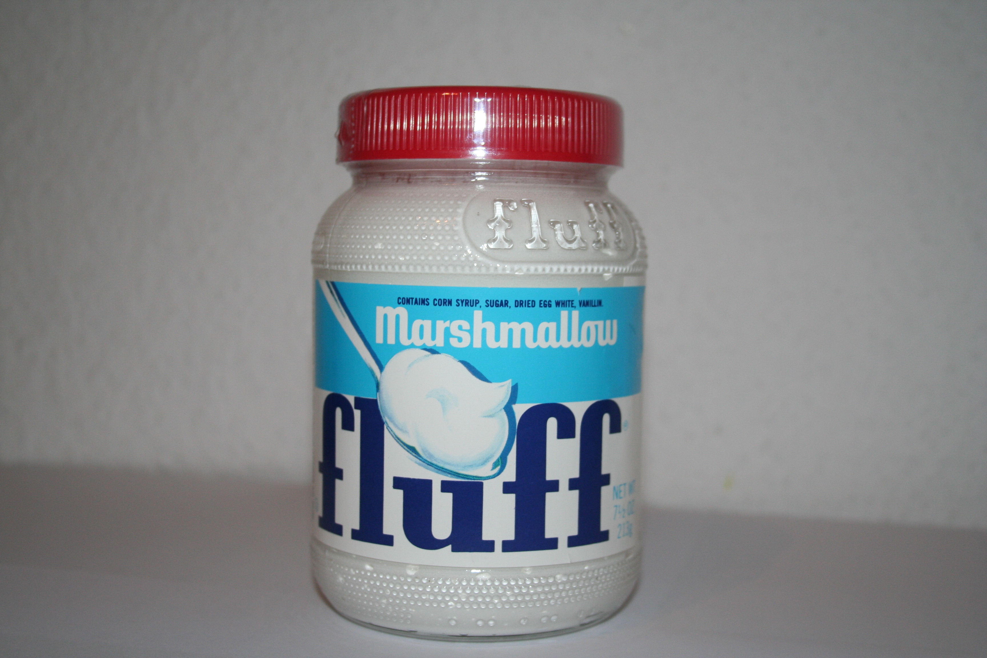 Ein Glas Marshmallow-Creme